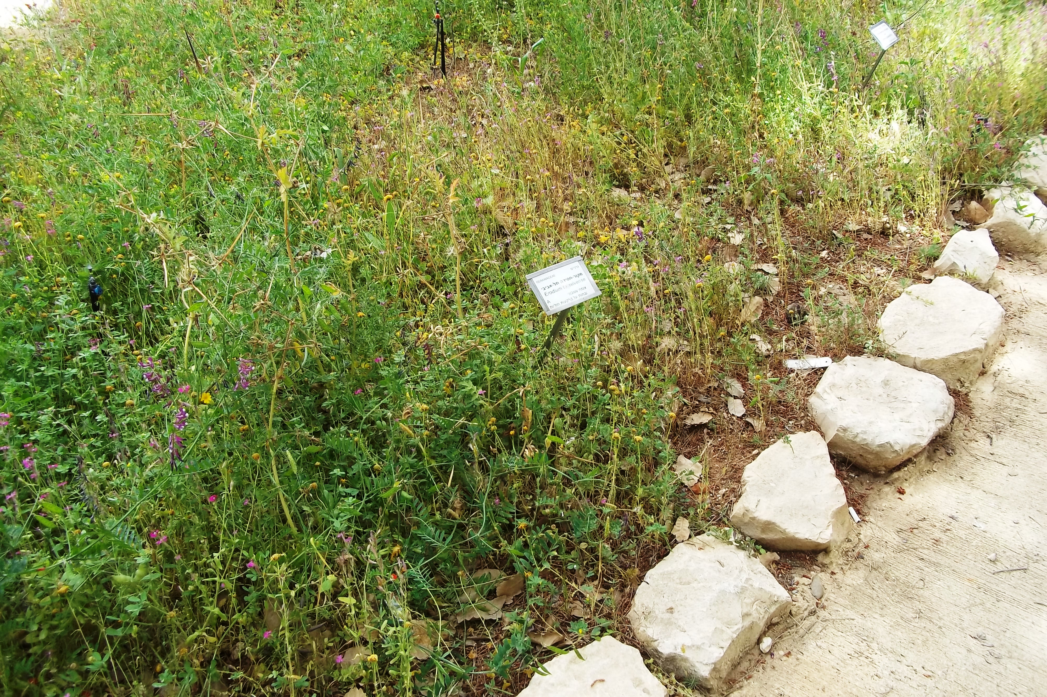 מצמחי הגן הבוטני בהר הצופים